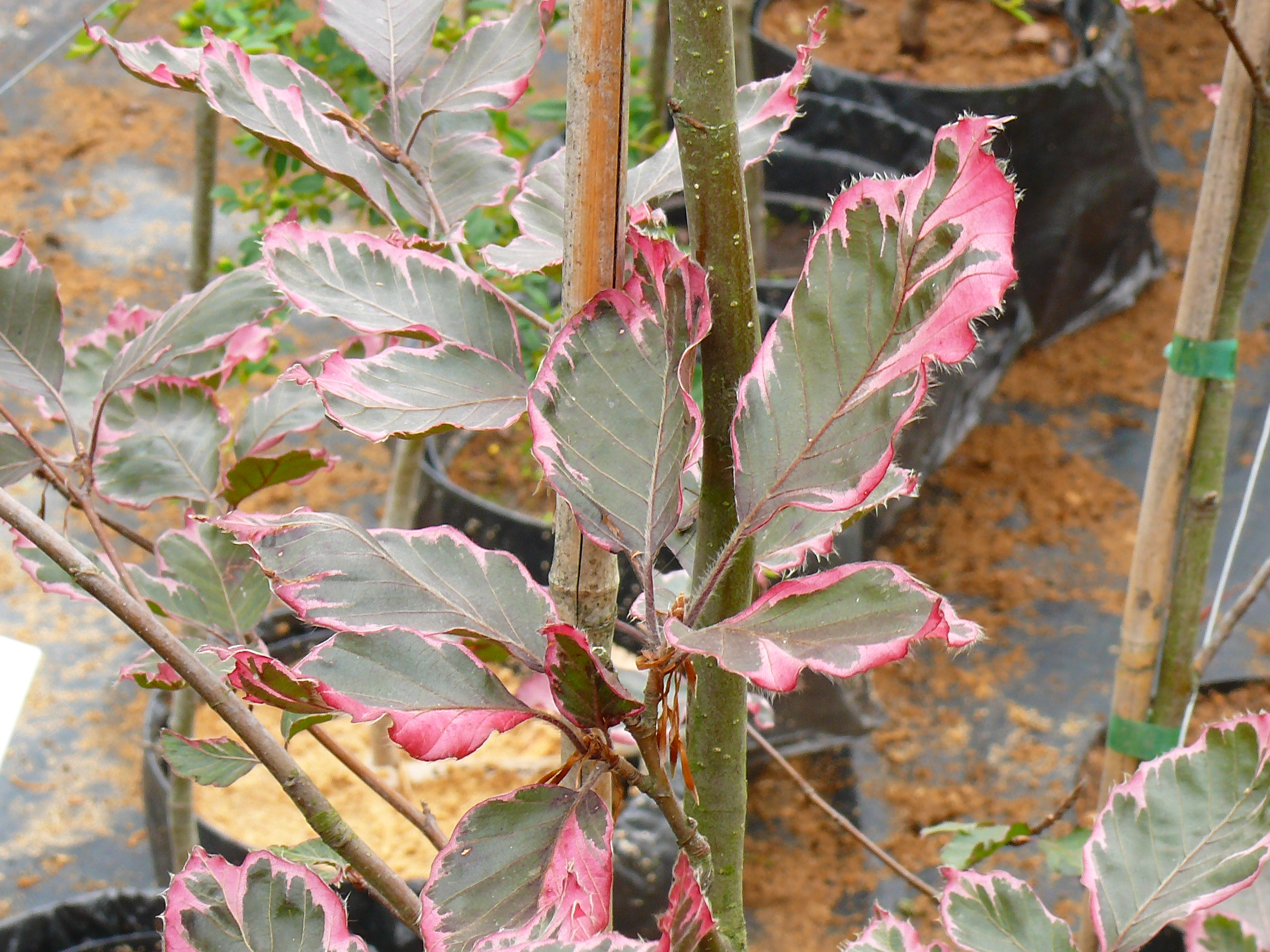 Fagus sylvatica 'Purpurea Tricolor' (syn. 'Roseomarginata')